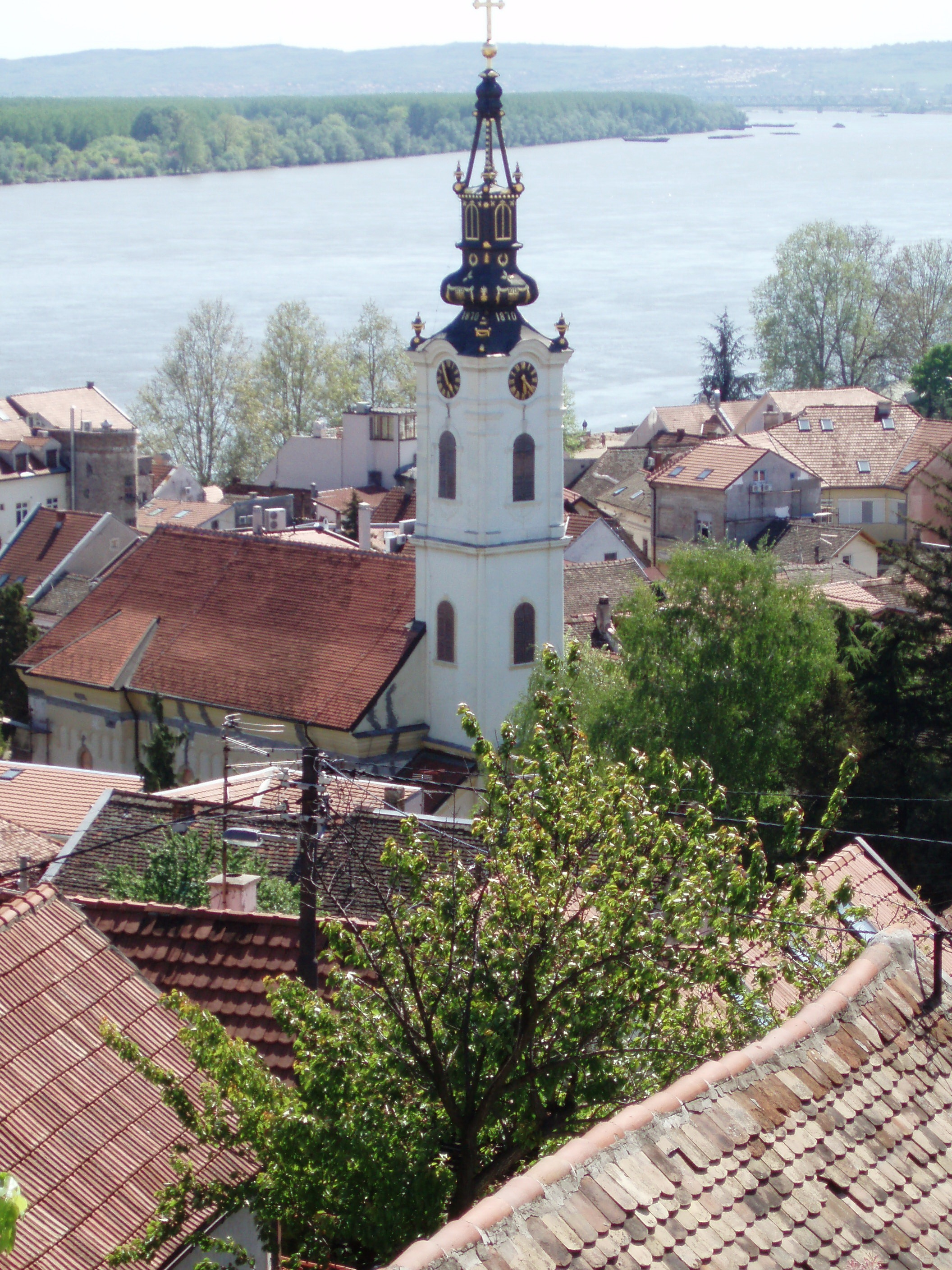 Фотографија Николајевске цркве у Земуну, поглед са Гардоша, аутор фотографије: Nicolo